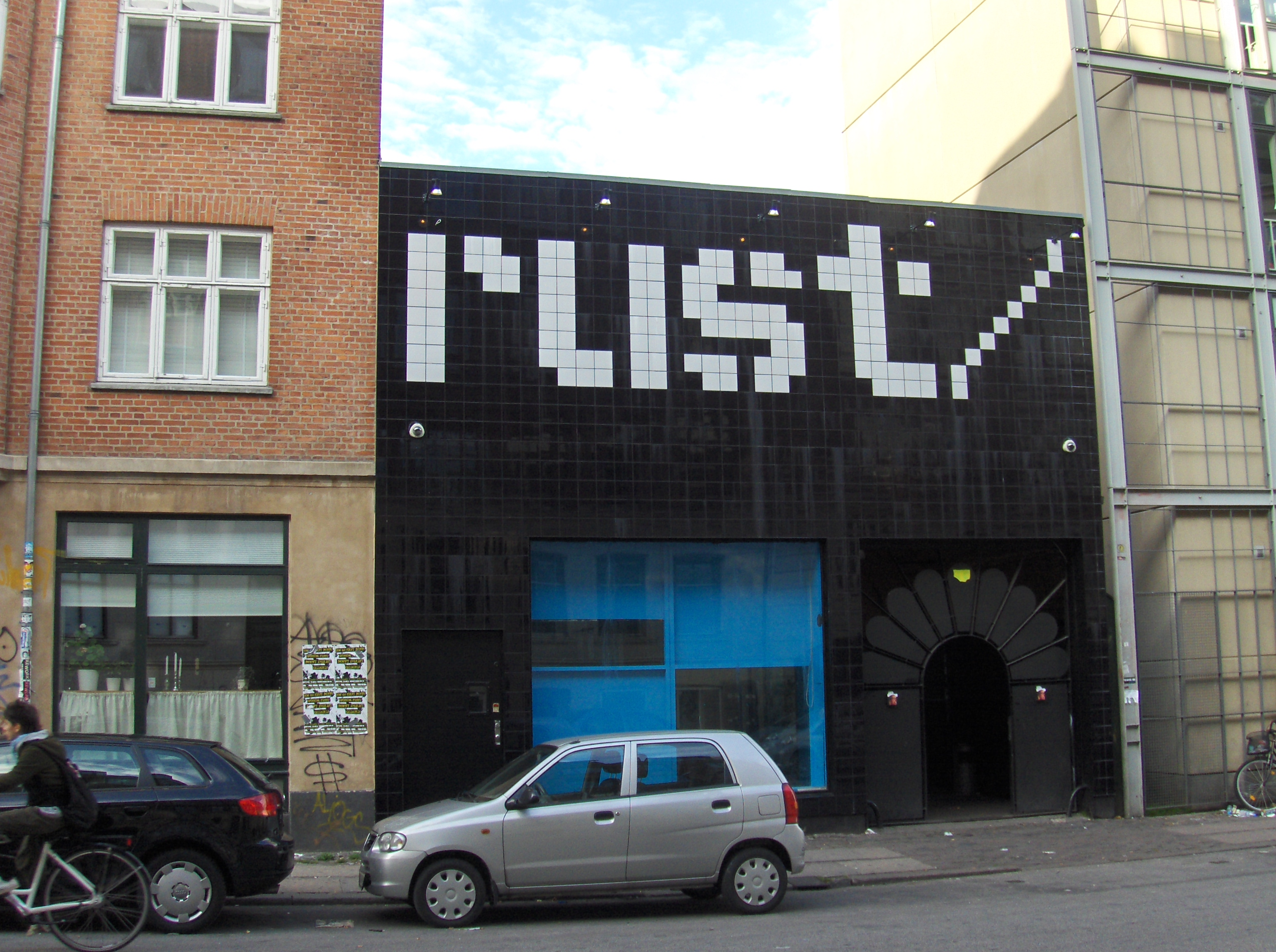 RUST